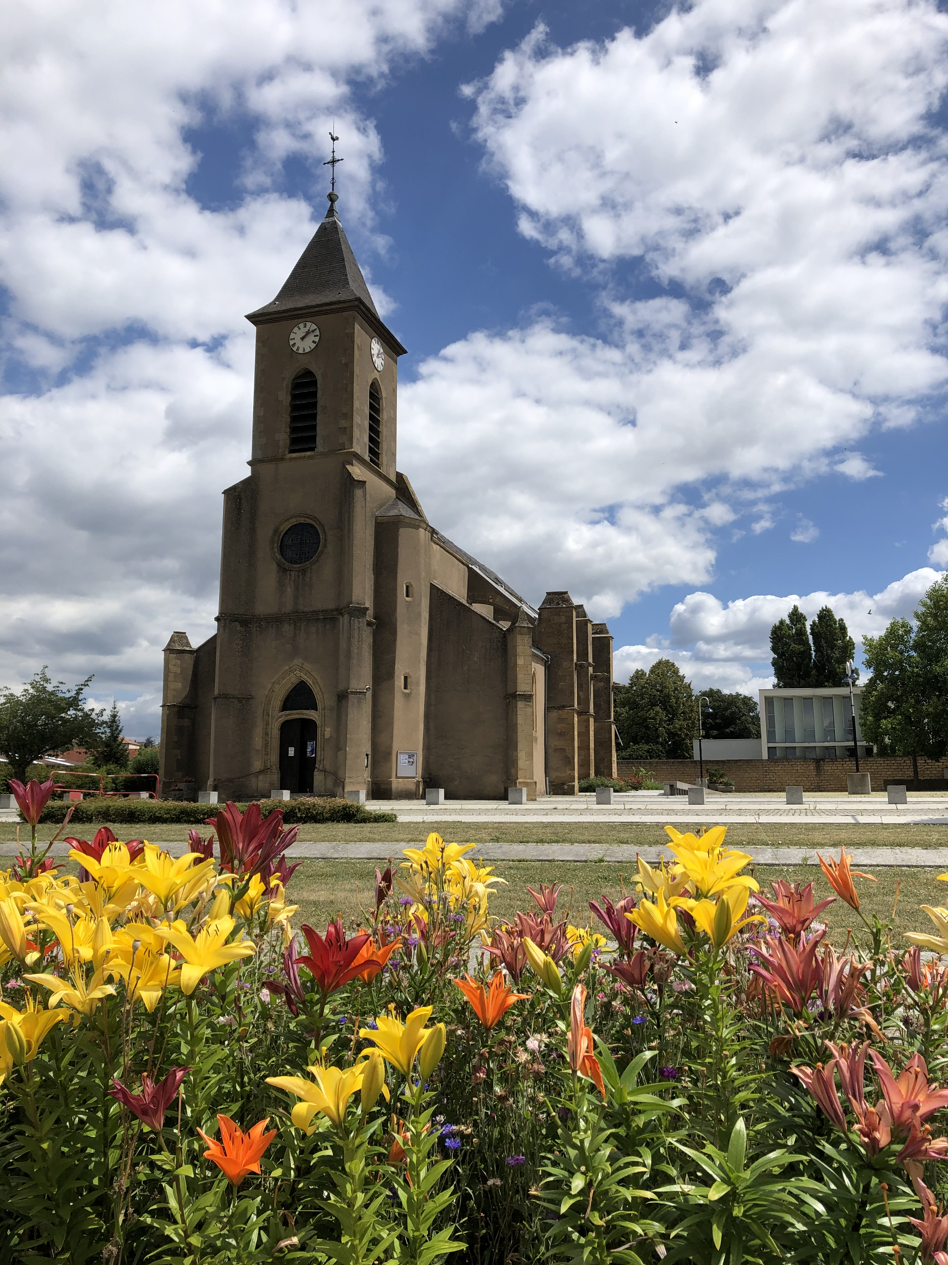 Eglise paroissiale de Bousse